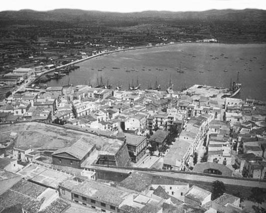 Imatge